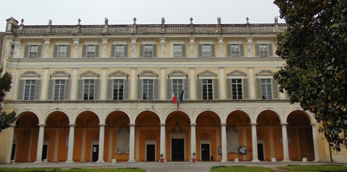 Questa foto rappresenta il municipio di Verolanuova